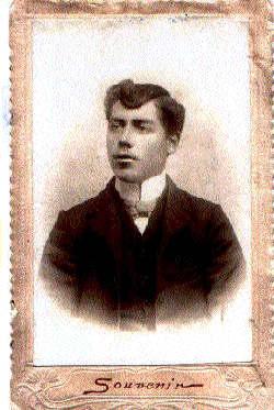 Христо Узунов